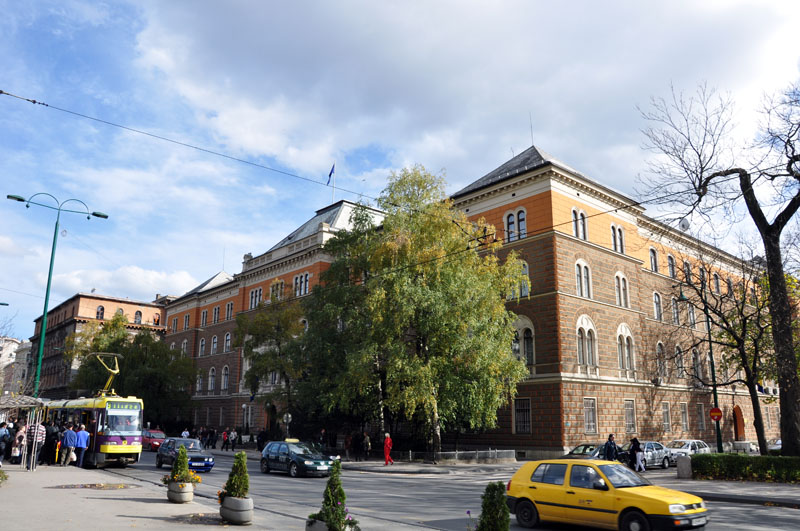 Predsjedništvo BiH